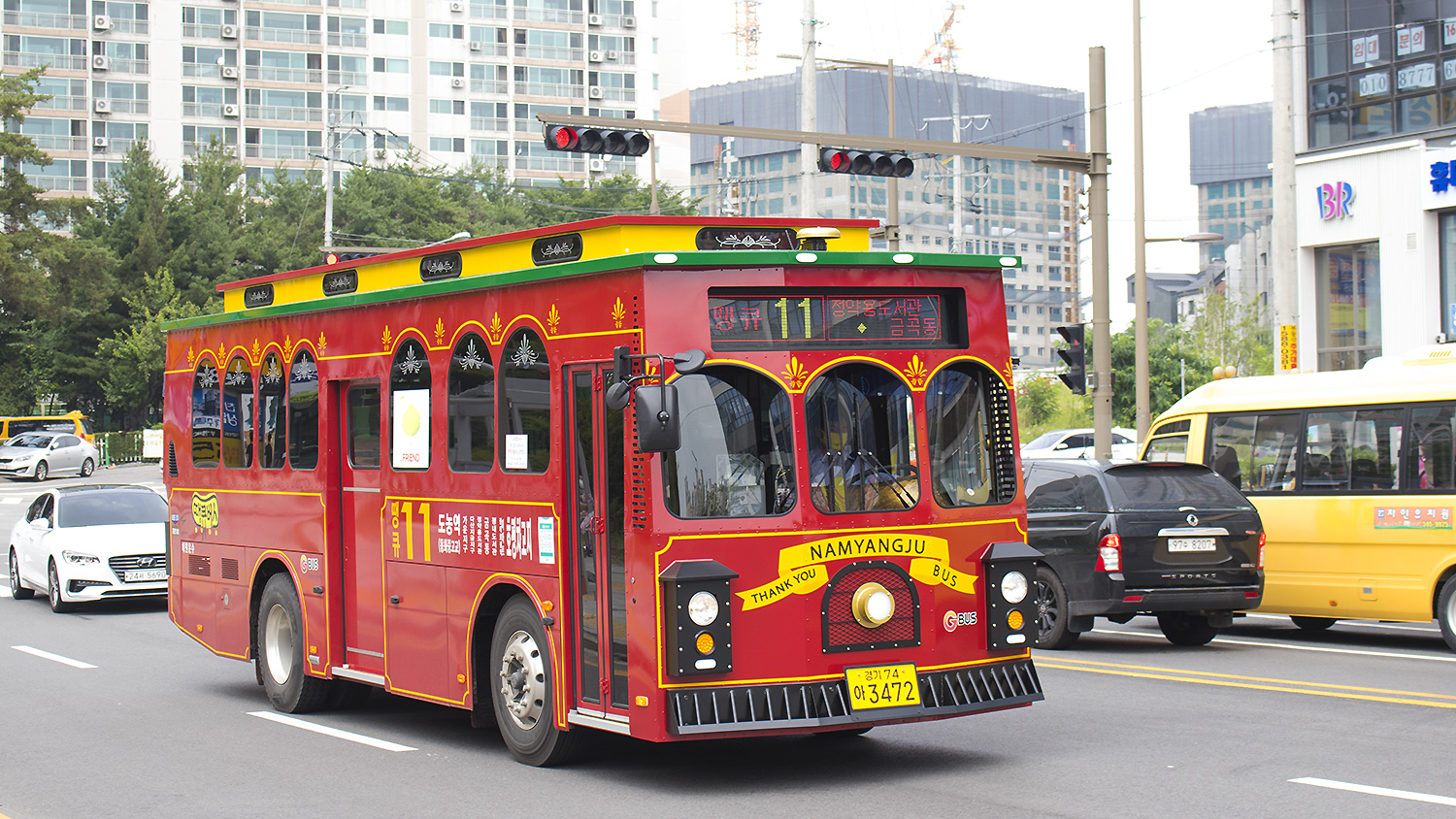 남양주시 땡큐버스 땡큐11번에 운행중인 트롤리버스